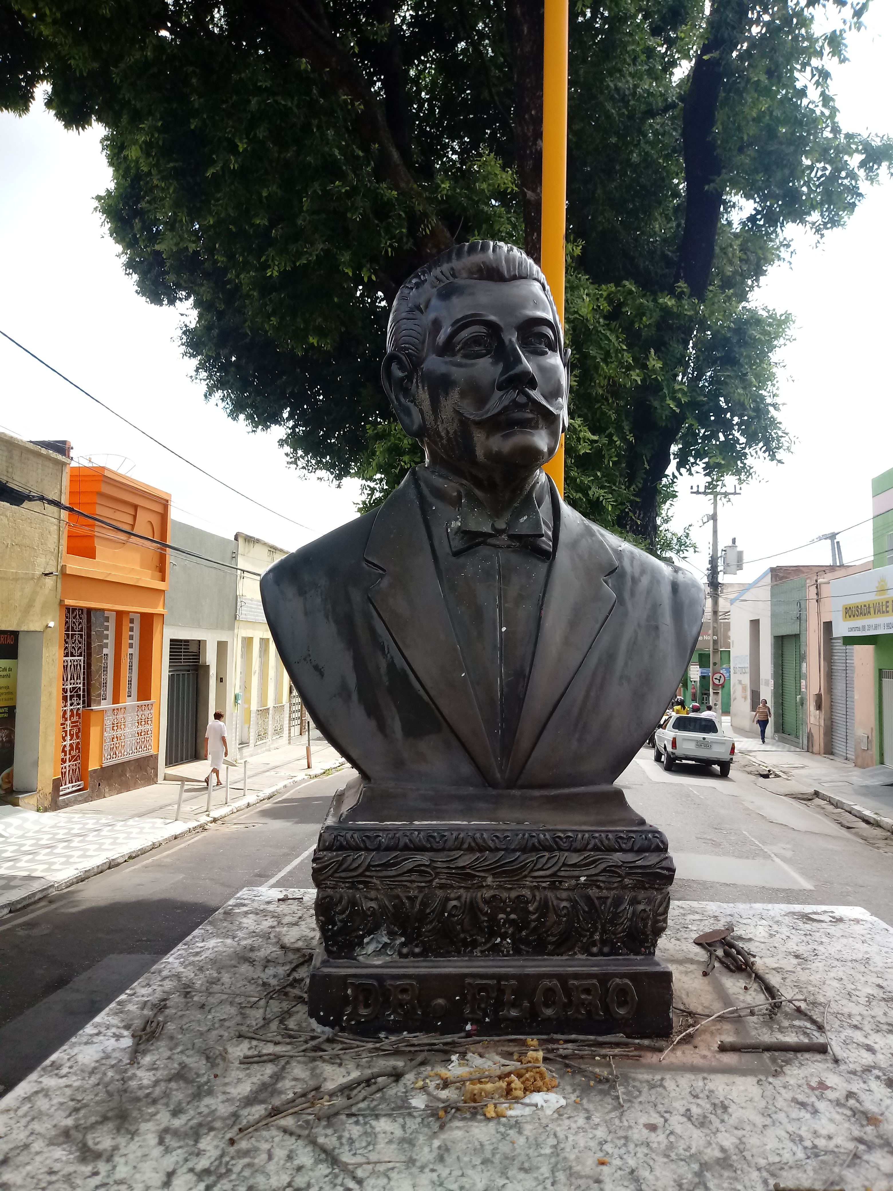 Busto de Floro Bartolomeu, na rua com o nome dele, em Juazeiro do Norte.